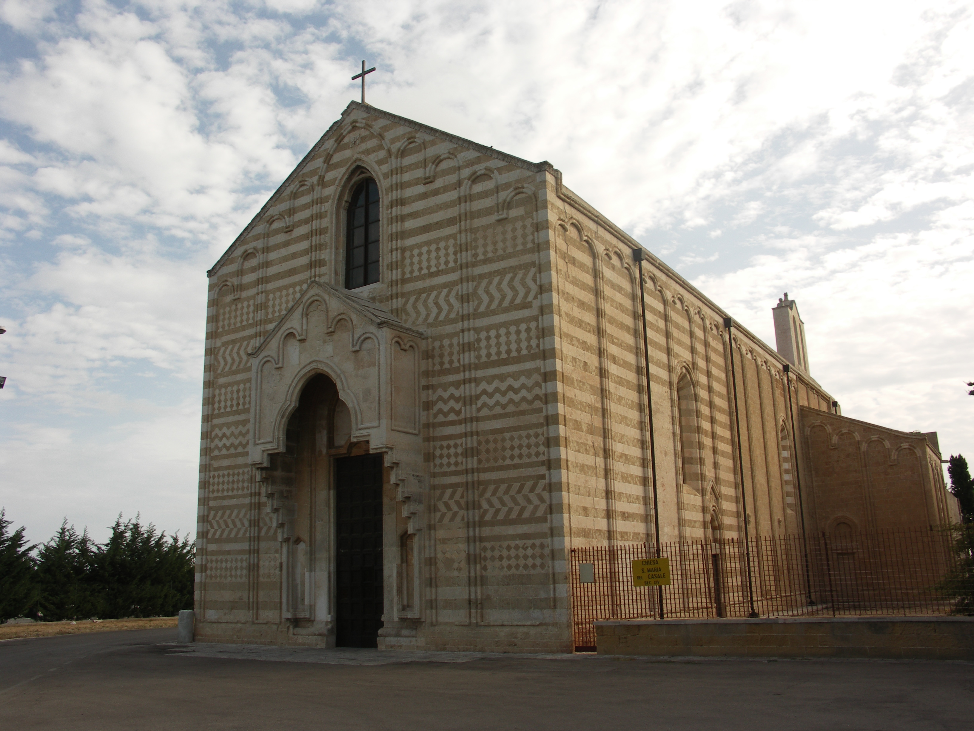 Casale esterno